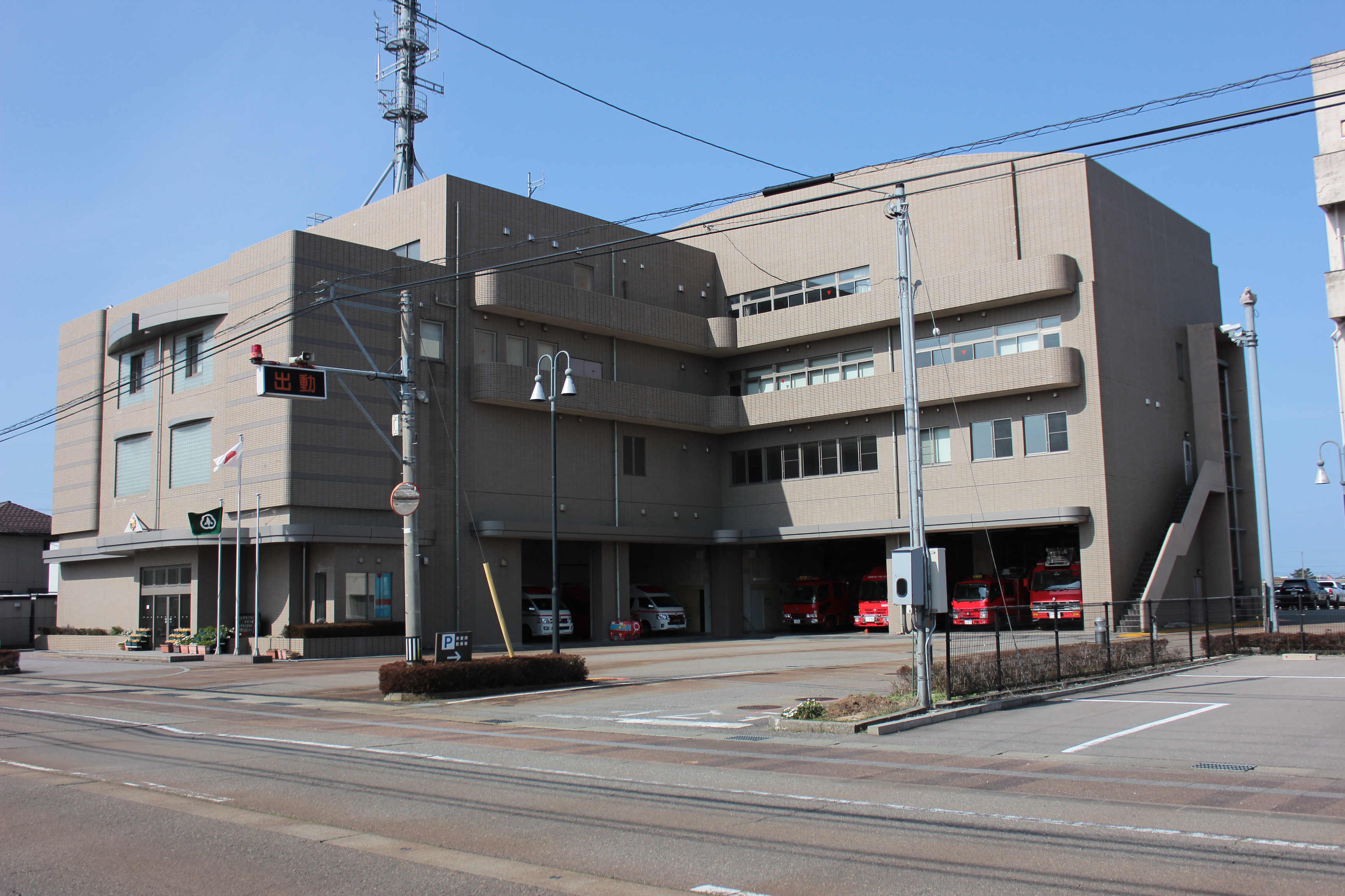 小松市消防本部・中消防署（石川県小松市） Canon EOS Kiss X5